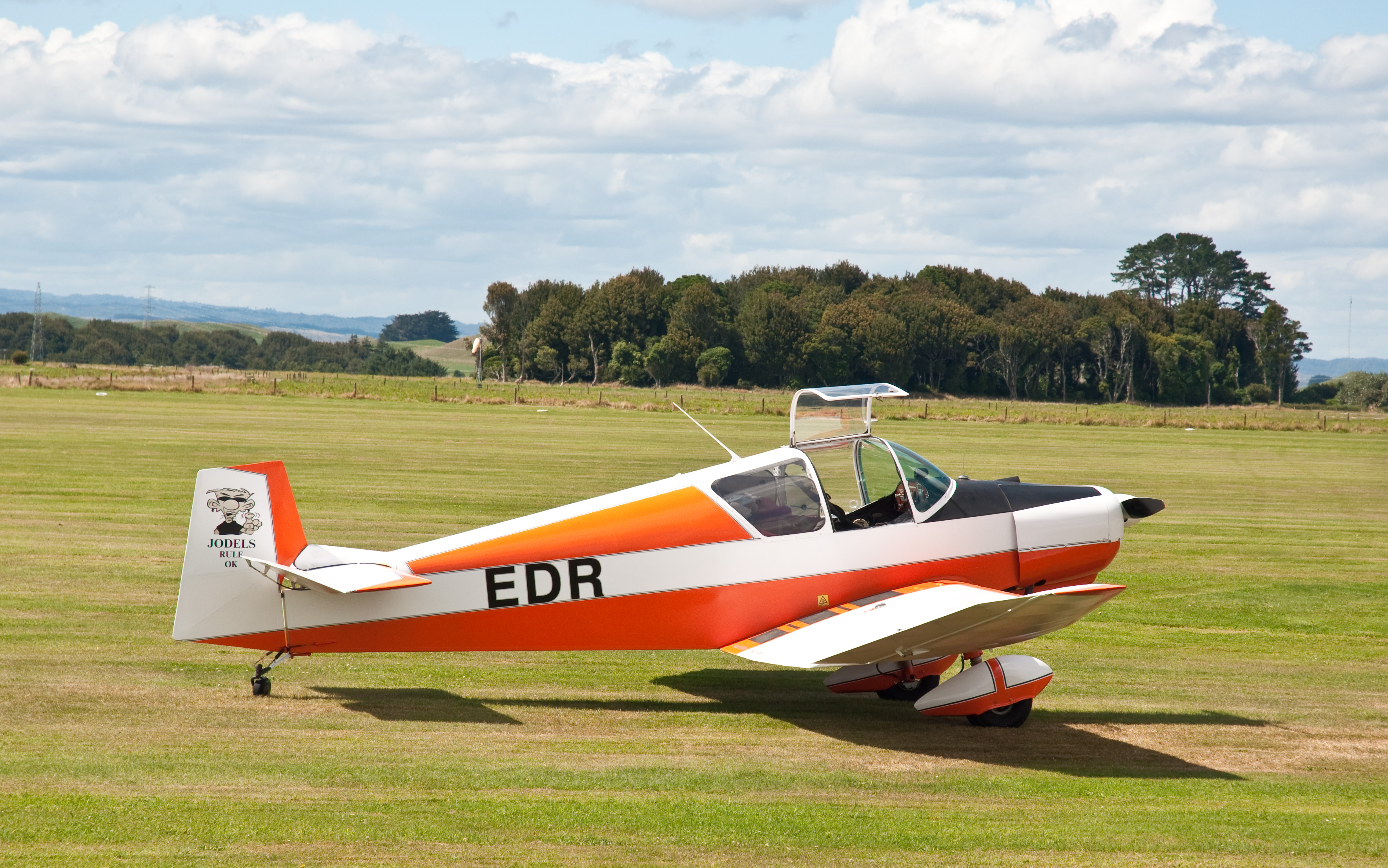 Jodel D11 ZK-EDR